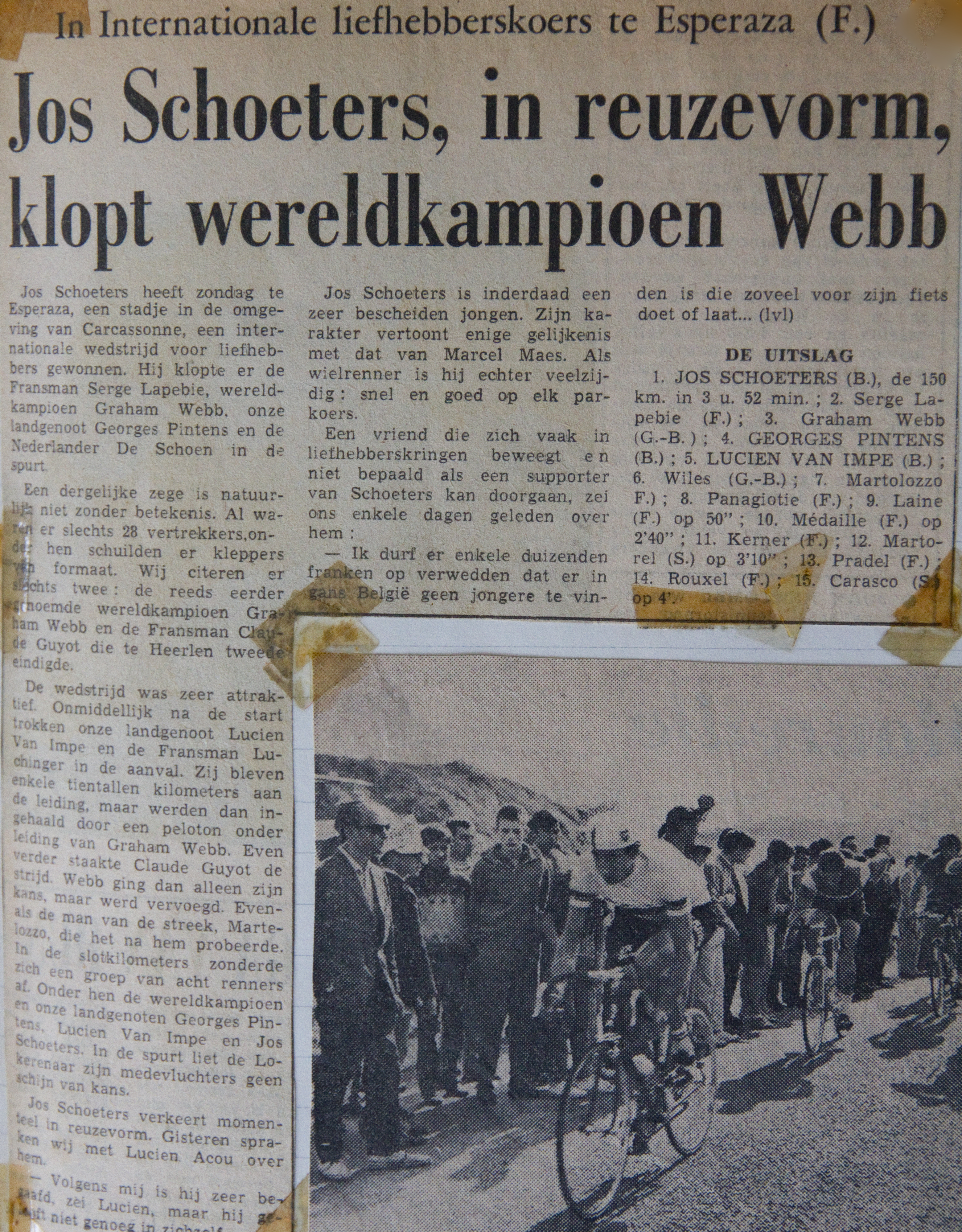 Klopt wereldkampioen Webb.